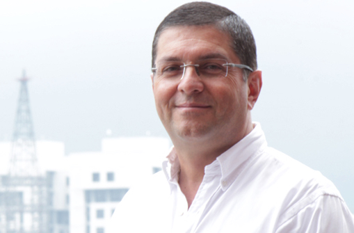 by_Max_Genes